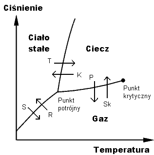 Stany skupienia diagram Rysunek wykonany na wzór rysunku z angielskiej Wiki - napisy moje